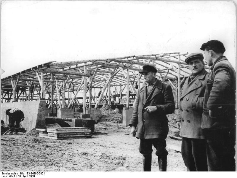 Streumen, LPG, Bau eines Stalls Zentralbild Löwe Weiß-Qu-10.4.1958 Streumener Gemeindevertreter unterstützen Offenstallbau-Ein ganzes Programm über die Hilfe der Genossenschaftsbauern für den Bau eines Offenstalles ist in Streumen im Kreis Riesa die Voraussetzung dafür, daß der Bau um über 10.000 DM verbilligt werden kann. Diesen Wert gaben die freiwilligen Arbeiten, die von den Einwohnern der Gemeinde an diesem au geleistet werden. Die Aufgaben für die freiwilligen Helfer legten die Gemeindevertreter bereits vor Beginn des Baues gemeinsam mit dem Vorsitzenden der LPG fest. Der ständigen Kontrolle durch den Bürgermeister Guthaus und die Gemeindevertreter ist das Zusammenwirken mit dem ausführenden Kreisbaubetrieb gelungen, den Streumener Stall, der für 50 Jungtiere bestimmt ist, als ersten im Kreis zu richten. UBz: vlnr: Der stellvertretende Vorsitzende der LPG Kurt Vogelgesanng, Bürgermeister Arthur Gutmann und der Polier Georg Schäfer besprechen gemeinsam am Bauplatz die weiteren Einsätze der Einwohner.